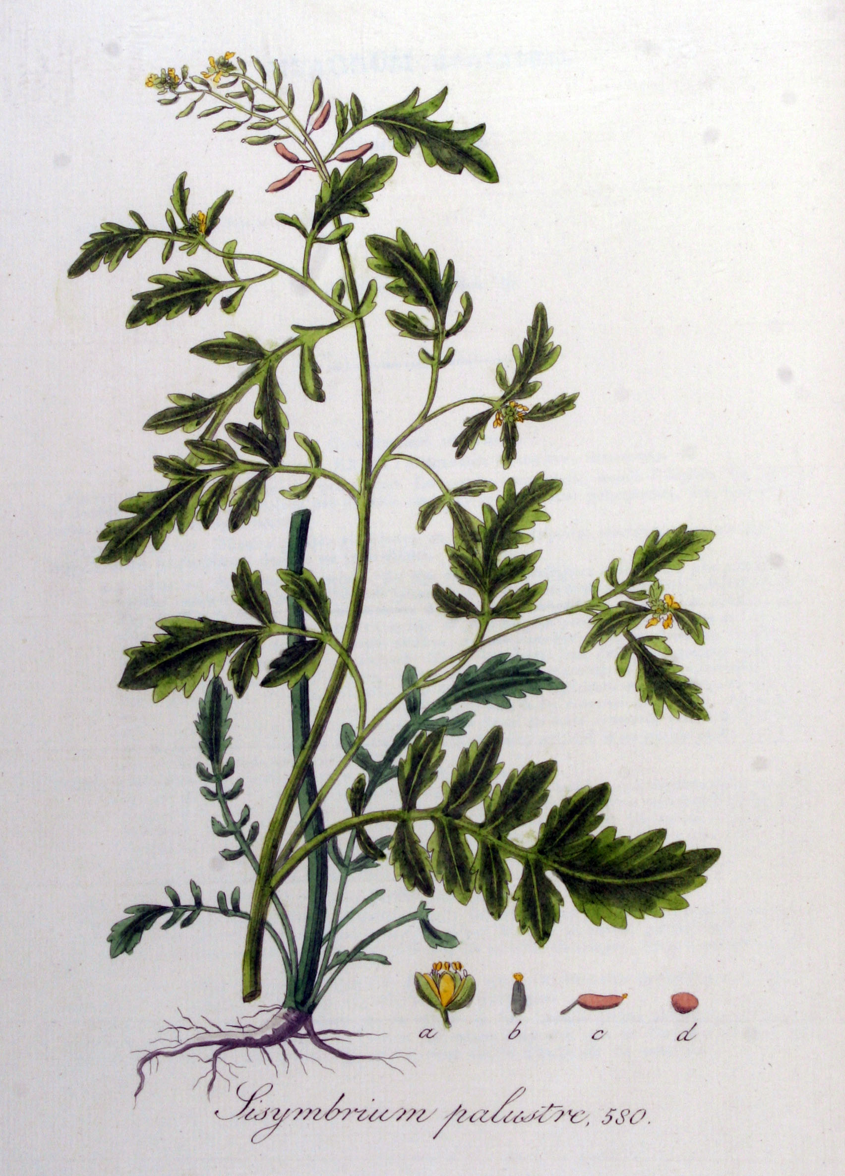 Rorippa palustris (L.) Besser (Syn. Sisymbrium palustre (L.) Leyss.)